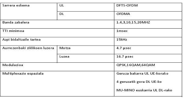 Lte 8.bertsioa